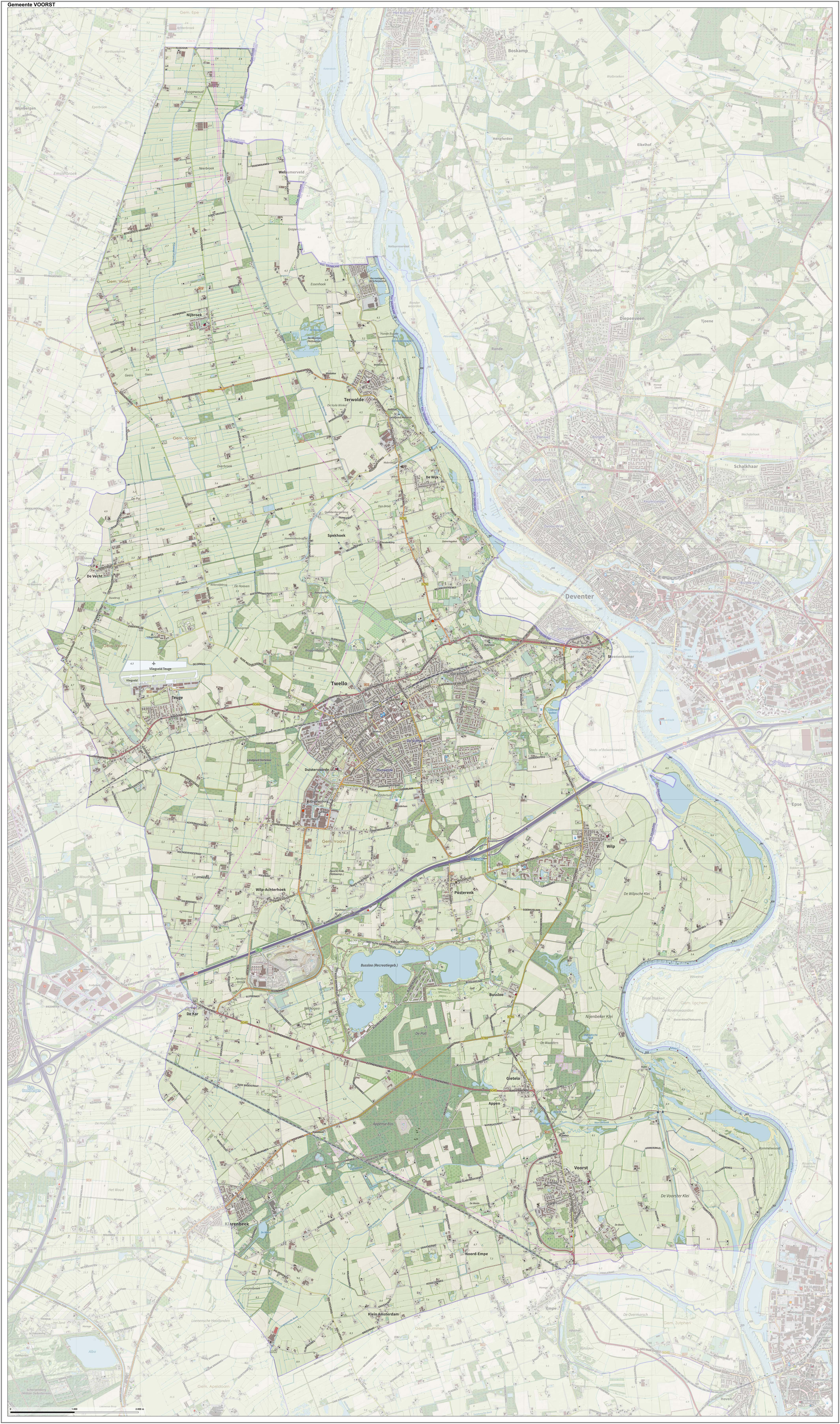 Topografische gemeentekaart. Resolutie: 400 pixels/km. Kaartbeeld samengesteld uit de open geodata van de Top10NL en Top25namen (Kadaster), Creative Commons-BY licentie. Gebouwvlakken uit open geodata BAG extract. Wegen uit de OpenStreetMap, OpenStreetMap community. Reliëfschaduw uit de Actuele Hoogtekaart AHN2. Samenstelling en kleurenschema: Jan-Willem van Aalst, met QGIS. Zie ook de Legenda.